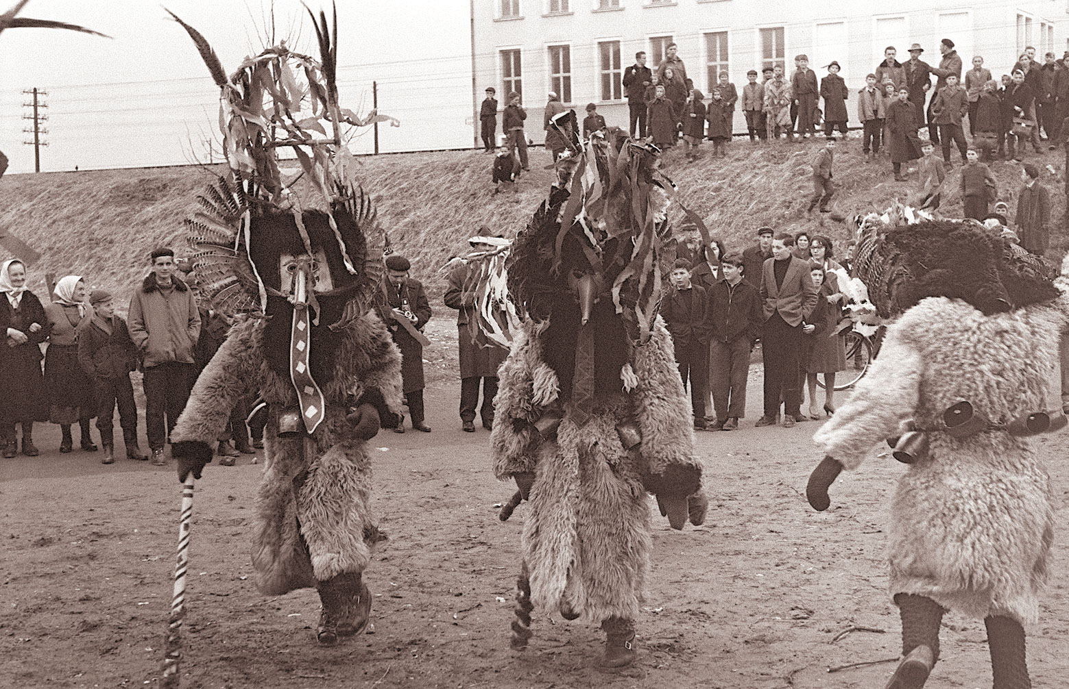 Veliko kurentovanje na Ptuju.